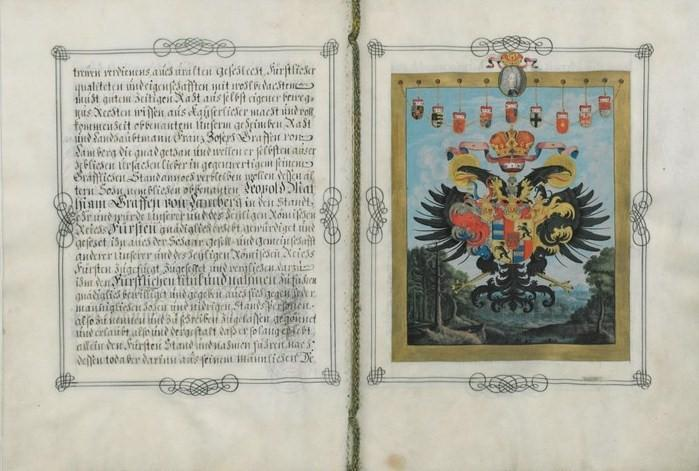 Reichsfürstenstandsdiplom (in Primogenitur vererblich) derer von Lamberg, mit Anrede „Hochgeboren“, Sukzessionsbestimmung im Falle des Erlöschens der Deszendenz und Wappenbesserung, Wien 1. November 1707 (für Leopold Matthias Graf von Lamberg, Kaiserlicher Geheimer Rat und Obersthofmeister, der am 10. Mai 1709 mit der Landgrafschaft Leuchtenberg belehnt wurde, am 24. Mai 1709 die Kaiserliche Intimation des Fürstenstandes als Landgraf von Leuchtenberg mit der Anrede „Hochgeboren“ erhielt und am 11. Juli 1709 in das Reichsfürstenkollegium aufgenommen wurde. Der Reichsfürstenstand wurde am 22. Mai 1711 auf seinen Vater übertragen, den Grafen Franz Joseph von Lamberg, Landeshauptmann in Österreich ob der Enns.)